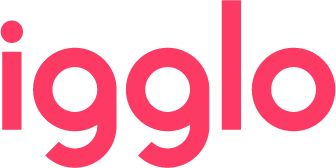 igglo logo